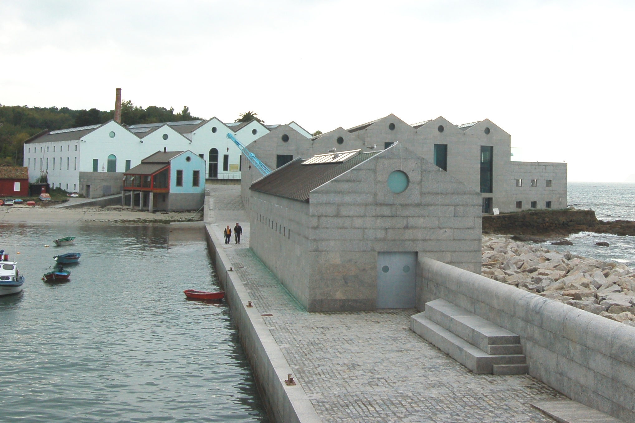 Vista xeral do Museo do mar de Galicia; ao fondo, a illa de San Martiño, do arquipélago das illas Cíes.